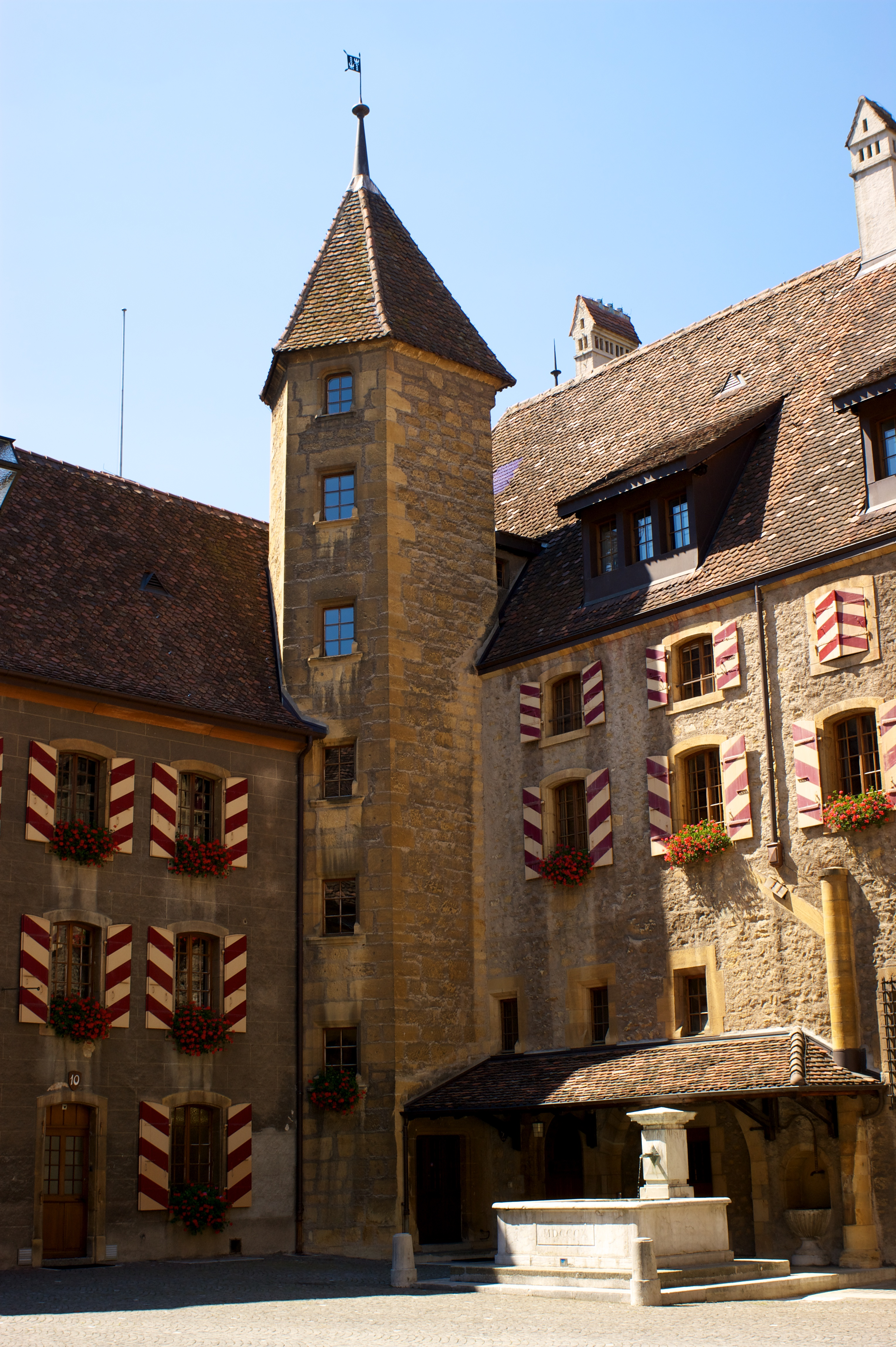 cour intérieur du chateau de Neuchatel